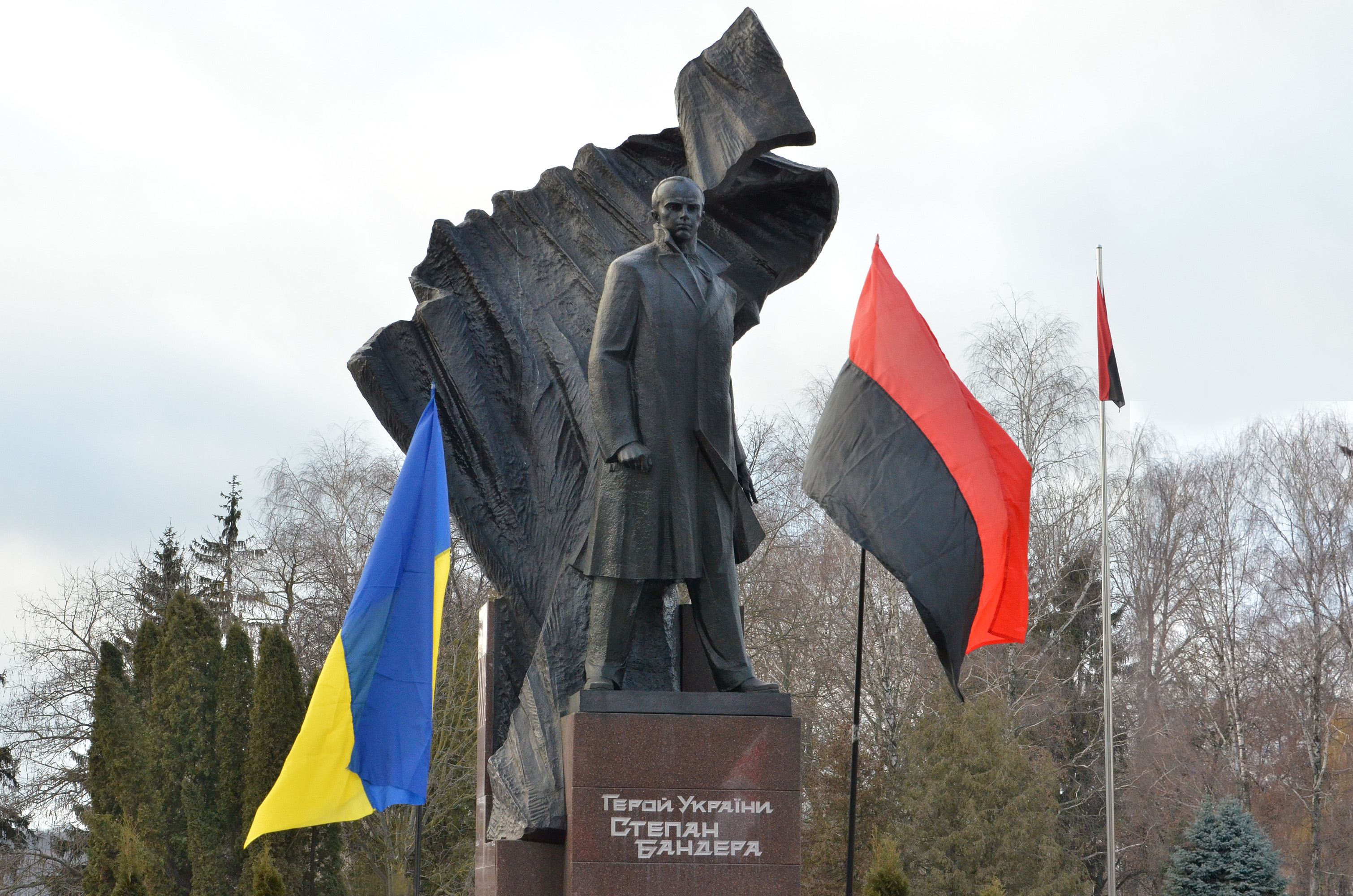 Пам'ятник провіднику Організації українських націоналістів Степанові Бандері в Тернополі, вул. С. Крушельницької, парк імені Тараса Шевченка, біля обласної державної адміністрації. Автор пам’ятника скульптор Роман Вільгушинський.